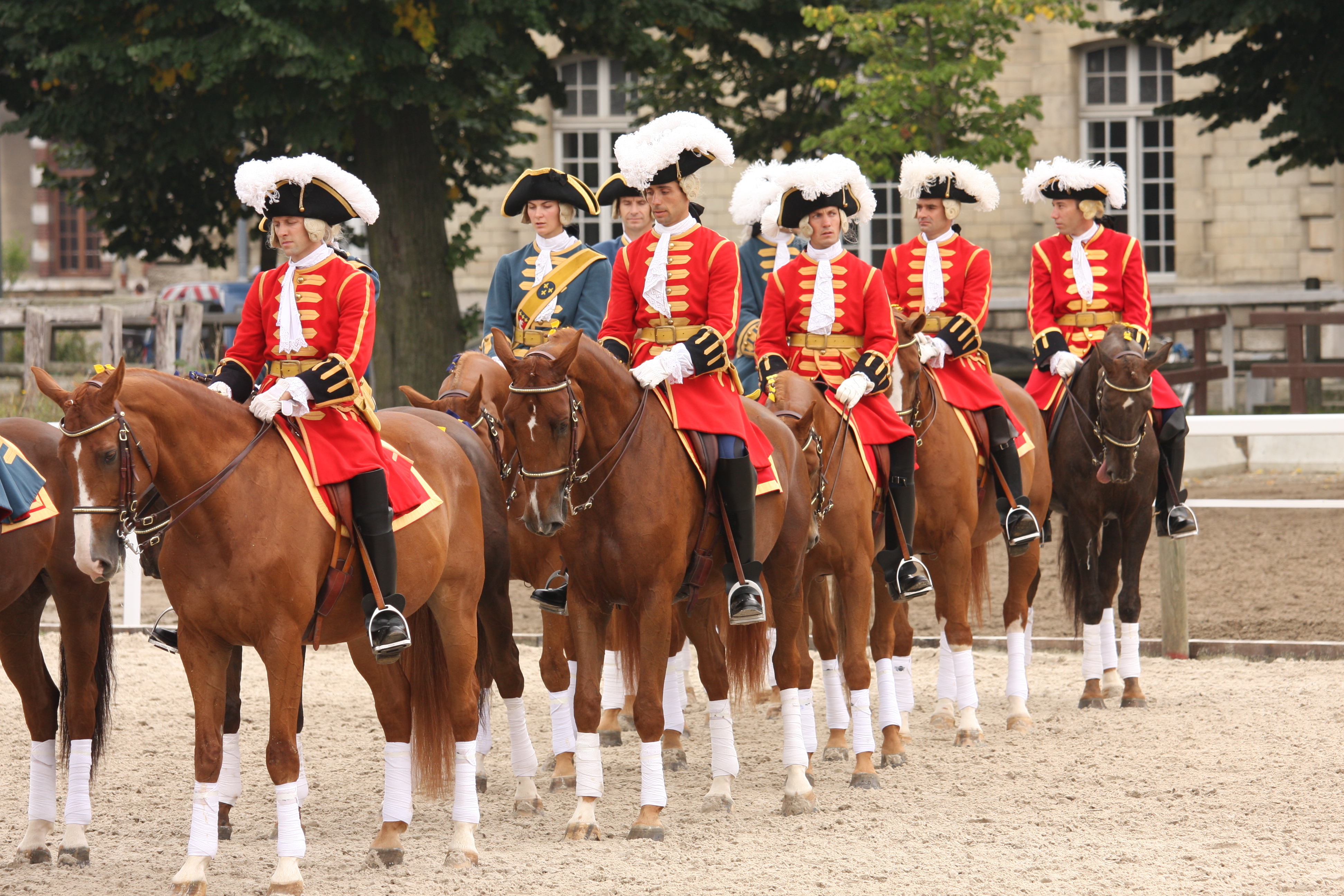 Les gendarmes de la garde de la Maison du Roy - Quartier Carnot - Septembre 2013